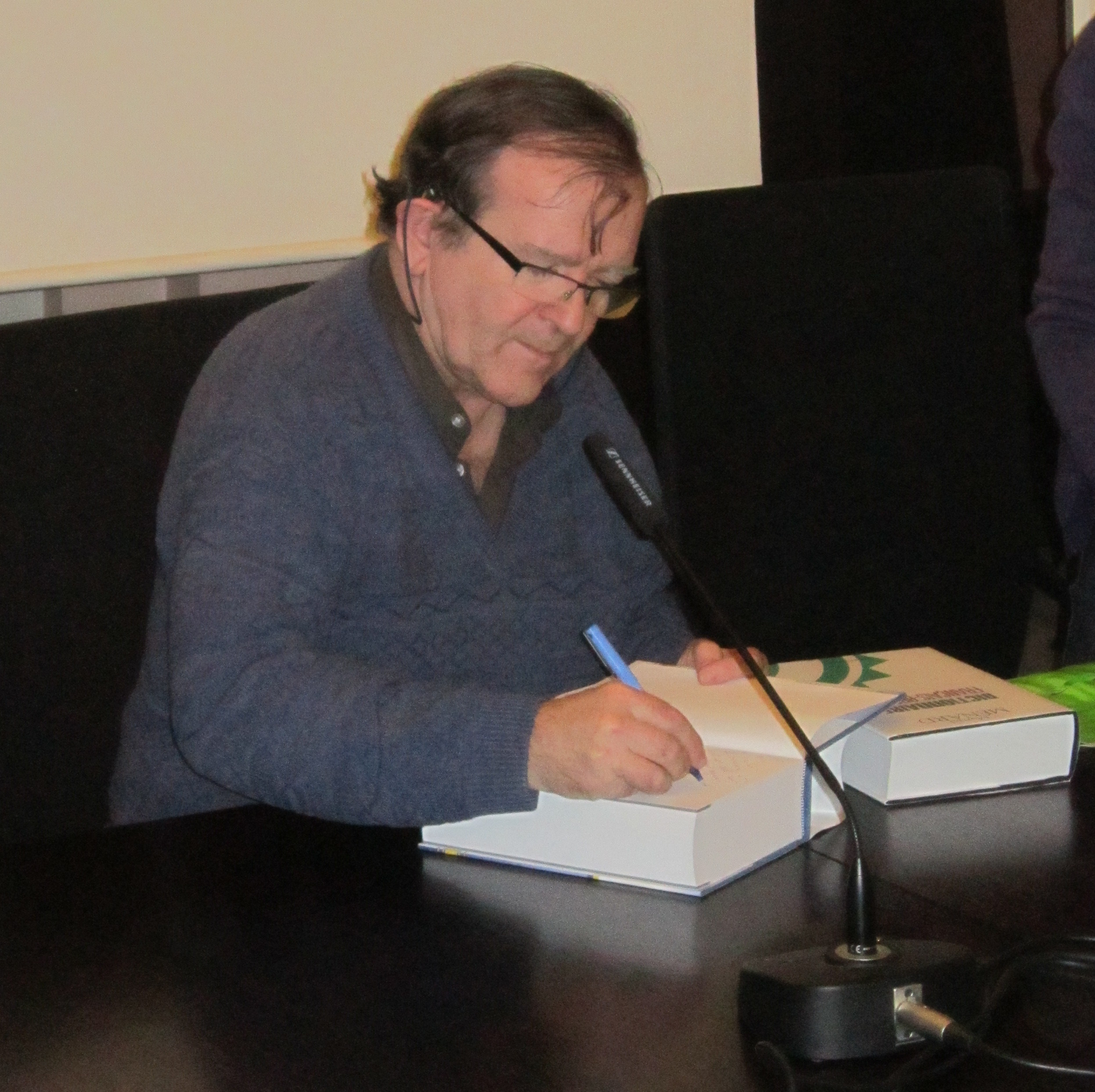 Martial Ménard o kinnig e c'heriadur "Galleg-Brezhoneg" en Oriant